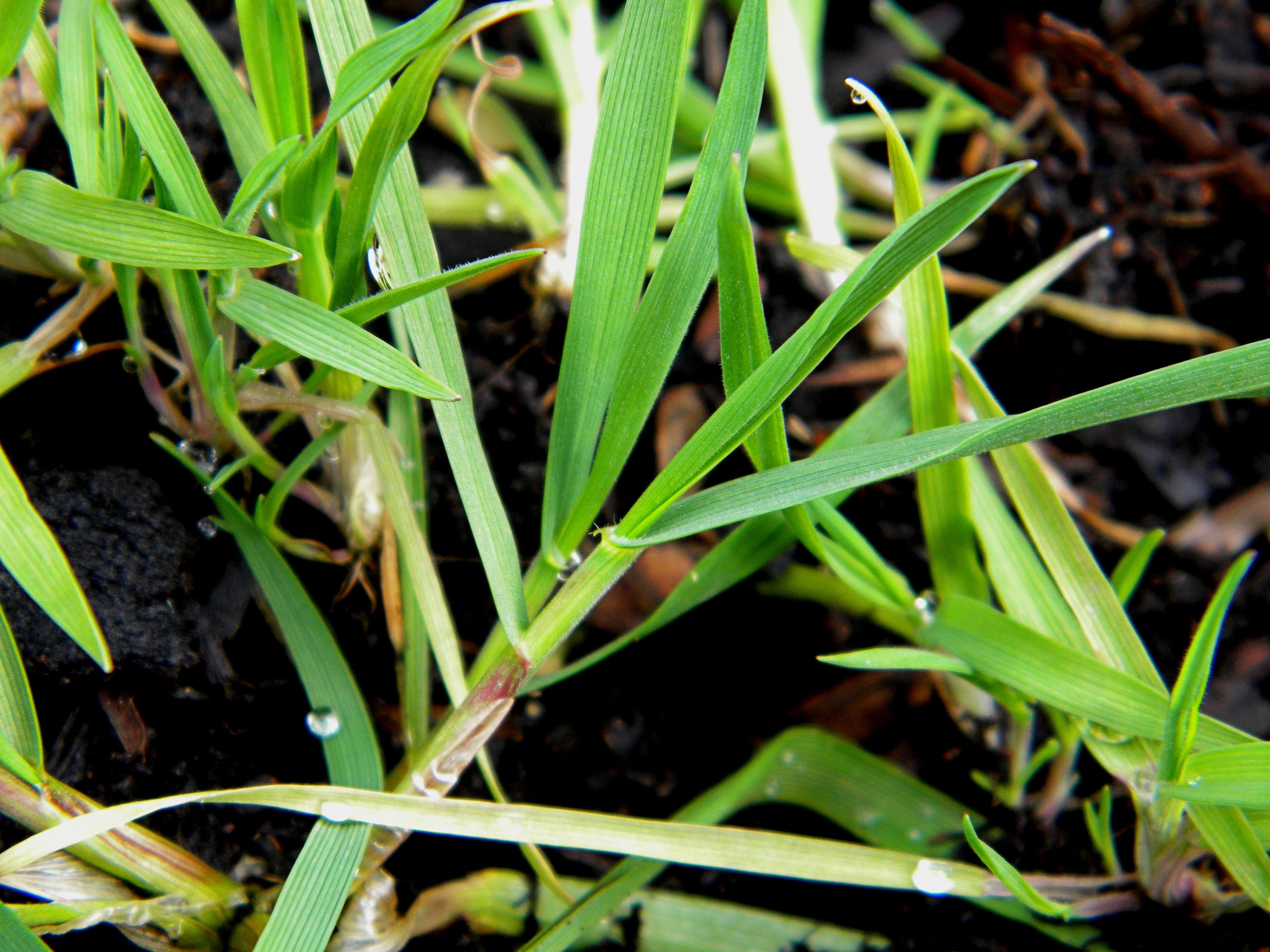 Festuca arundinacea Ligules bien développées poilues